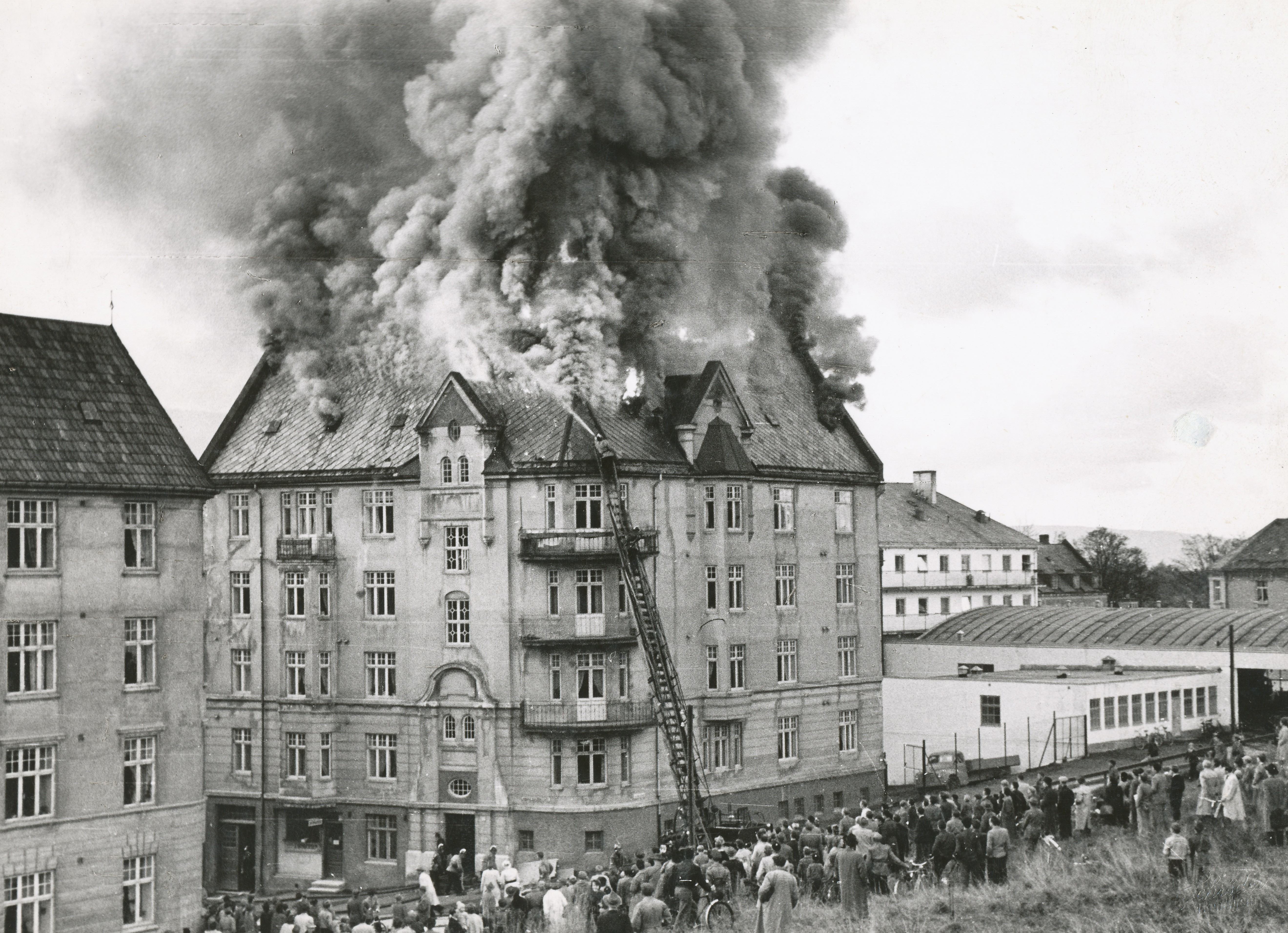 Magnus den Godes gate den 15. oktober 1953. Ukjent fotograf. Fra Trondheim Brannsvesens arkiv.